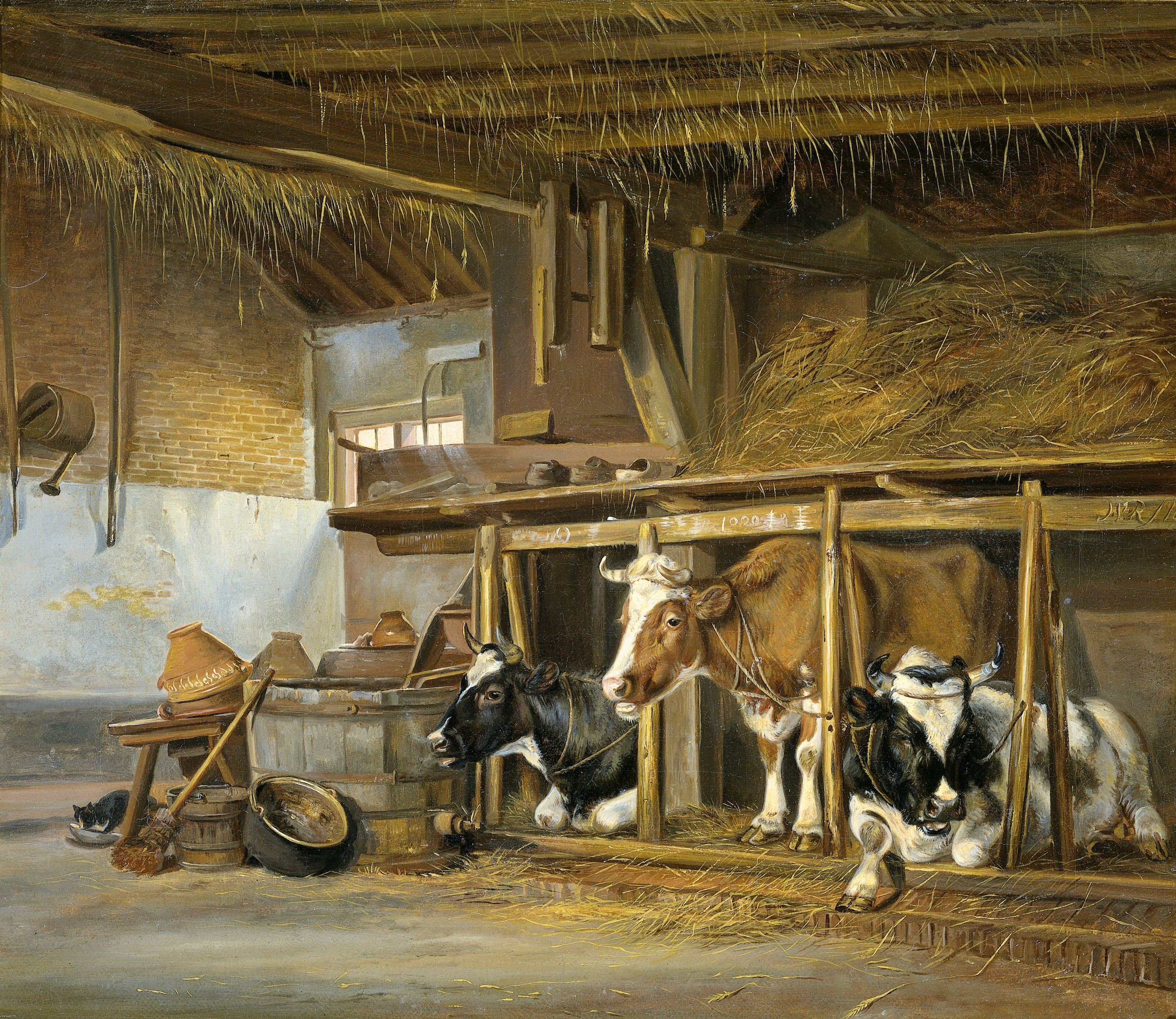 Interieur van een stal met drie koeien. Links emmers, ketels en een kat die melkt drinkt.